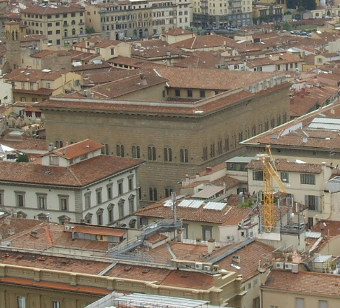 Palazzo strozzi, view